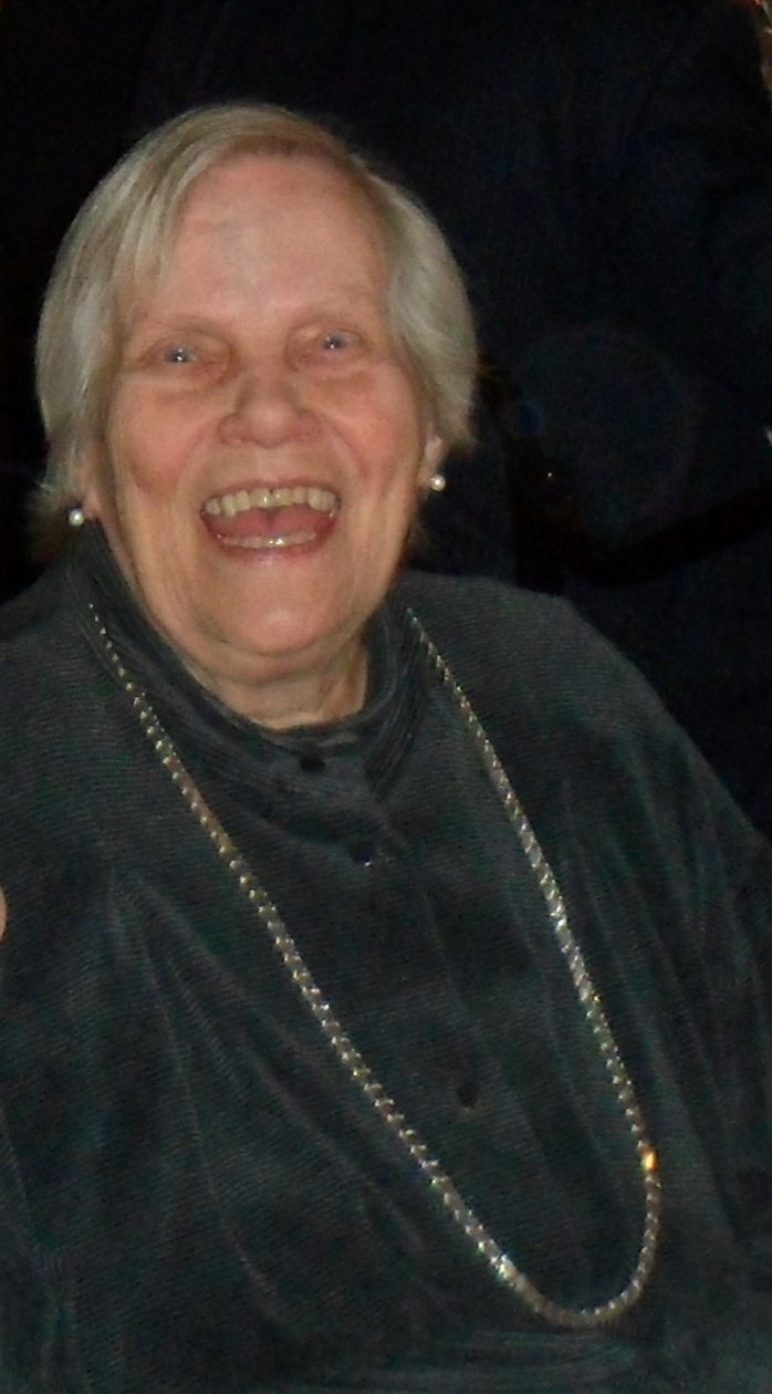 Ulla Ehrensvärd ; 1927-2015 ; konsthistoriker ; förste bibliotekarie på Kungliga biblioteket ; förste arkivarie på Krigsarkivet